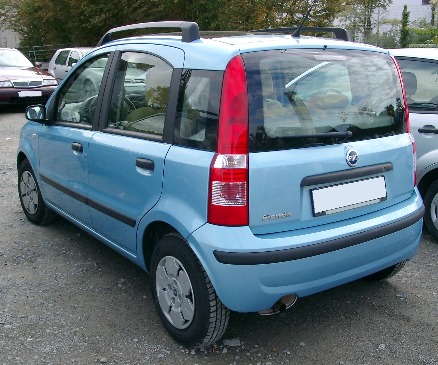 Fiat Panda